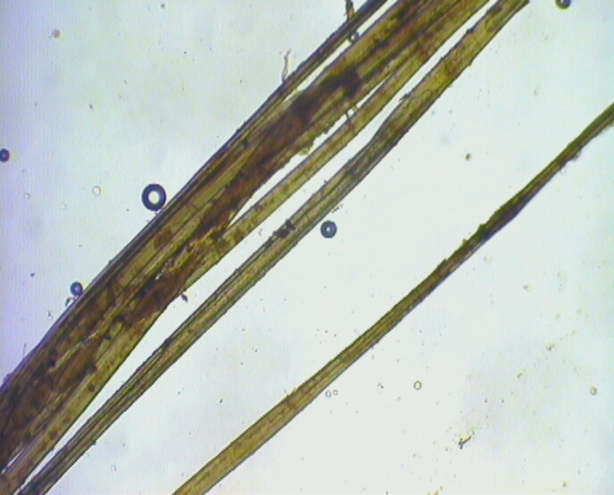 Foto della fibra di lino vista al microscopio. Realizzata dagli studenti dell'ITIS Marzotto di Valdagni (VI), ITALIA